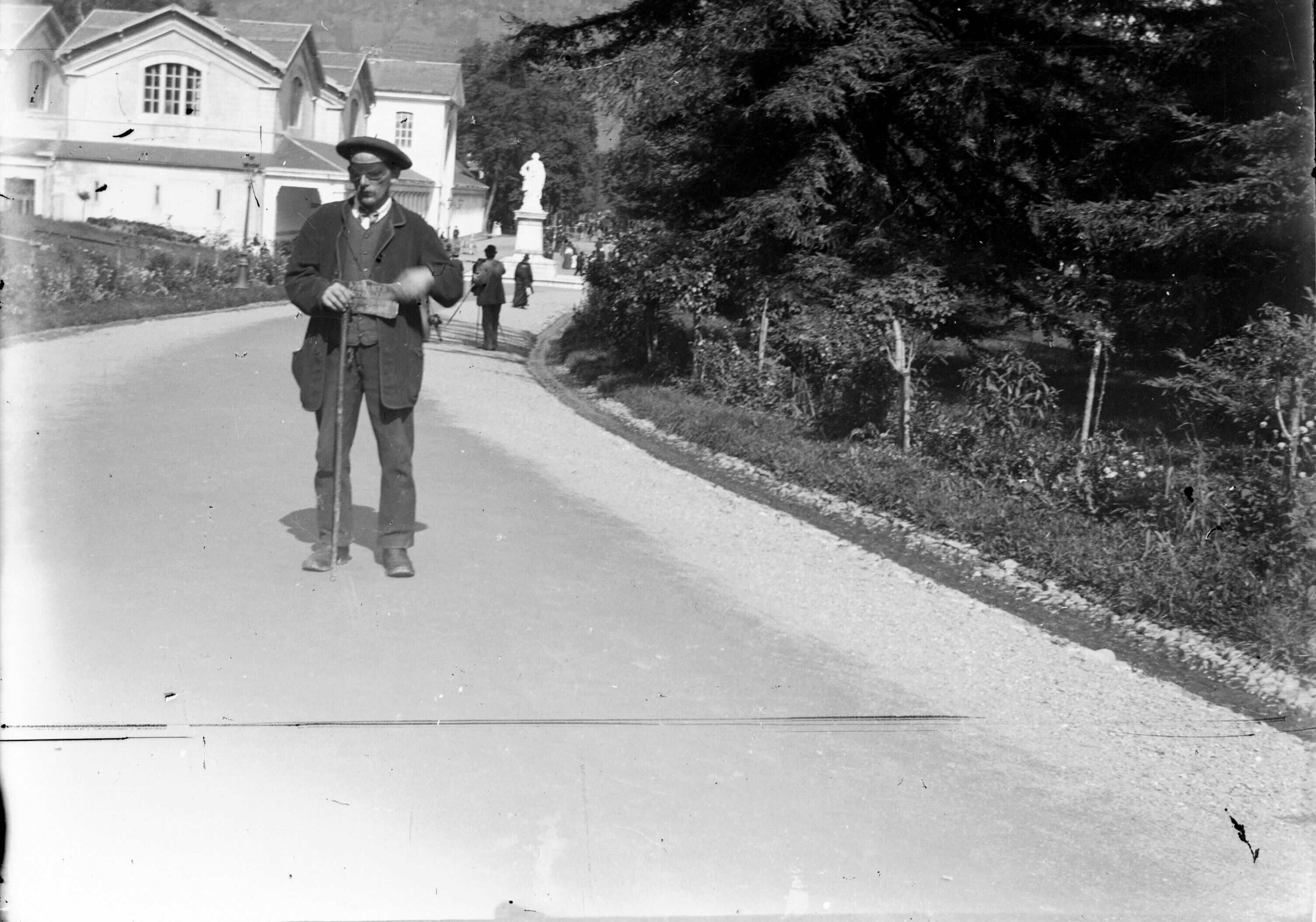 Fonds Trutat - Photographie ancienne Cote : TRU C 92 Localisation : Fonds ancien Original non communicable Titre : Etablissement thermal et statue d'Etigny, Luchon Auteur : Trutat, Eugène Rôle de l’auteur : Photographe Lieu de création : Bagnères-de-Luchon (Haute-Garonne) Date de création : : 1859-1910 [entre] Mesures : 8 x 9 cm Mot(s)-clé(s) : -- Homme -- Costume masculin -- Béret -- Canne -- Pancarte -- Aveugle -- Parc (public) -- Jardin public -- Allée -- Parterre -- Thermes -- Statue (urbaine) -- Etigny, Antoine Mégret d' (1720-1767) -- Bagnères-de-Luchon (Haute-Garonne) -- Thermes (Bagnères-de-Luchon) -- Statue d'Etigny (Bagnères-de-Luchon) -- Pique (France ; vallée) -- Pyrénées (France) -- 19e siècle, 2e moitié -- 20e siècle, 1e quart Médium : Photographies -- Négatifs sur plaque de verre -- Noir et blanc -- Portraits Bibliothèque de Toulouse. Domaine public